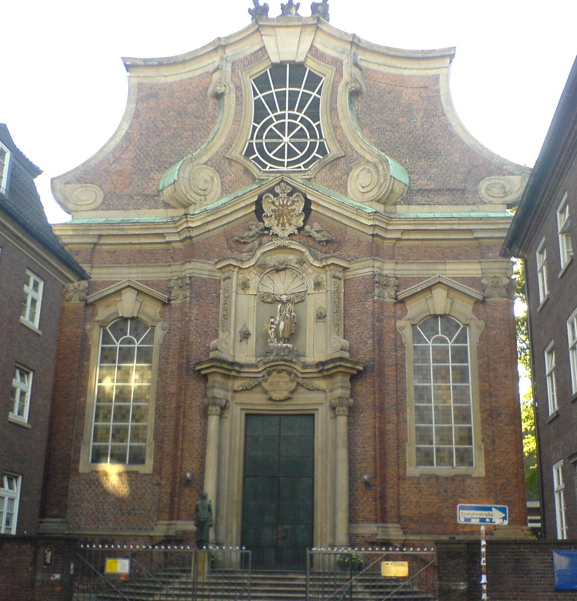 Bildbeschreibung: St. Joseph Freiheit This is a photograph of an architectural monument. Fotograf/Zeichner: PodracerHH 21:29, 3. Jul 2006 (CEST) Datum: 07.2006 Sonstiges: ...